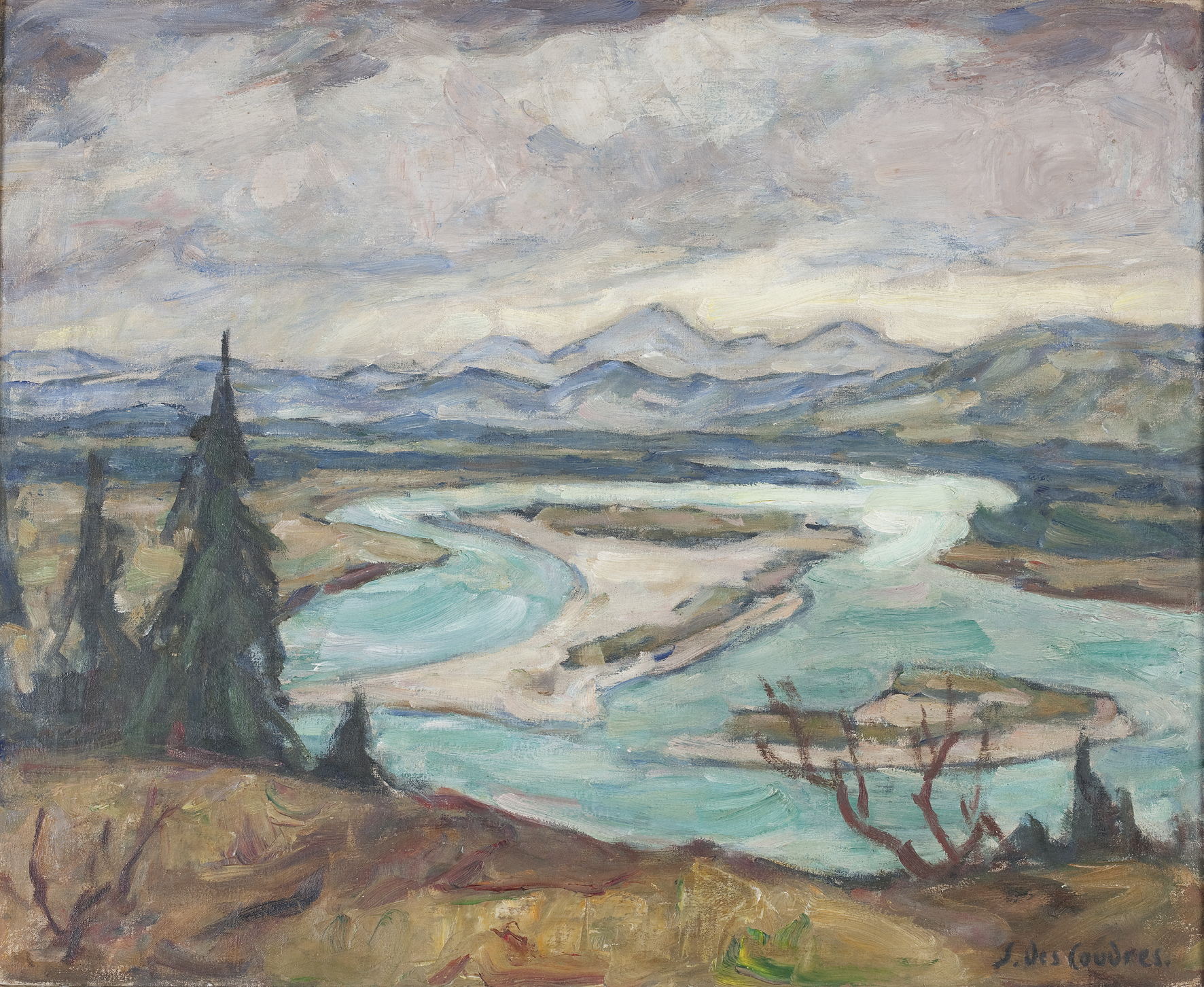 Gemälde "Isar"